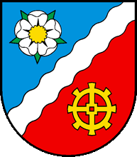 Wappen von La Sonnaz Kanton Freiburg Schweiz